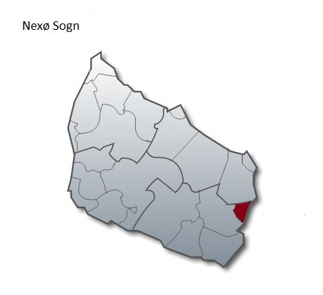 Nexø Sogn